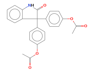 Izafenin 1